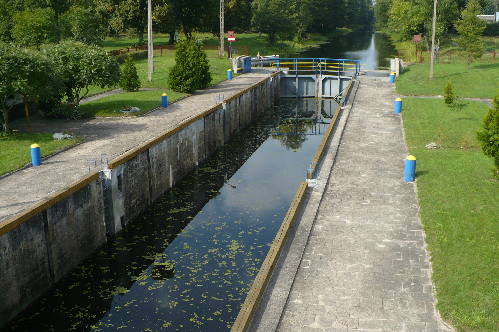 Śluza Sosnowo na Kanale Augustowskim